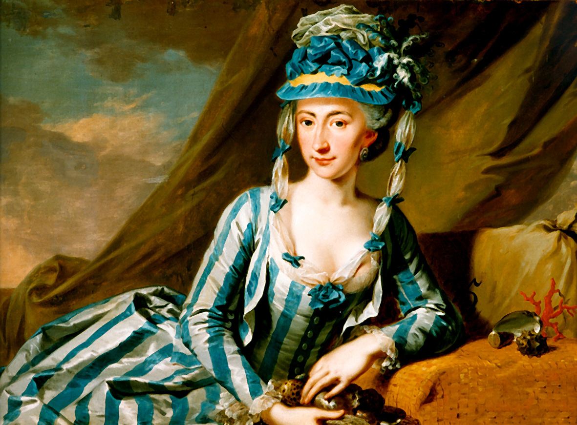 Reichsgräfin Marianne von der Leyen (1745-1804) (Blieskastel)